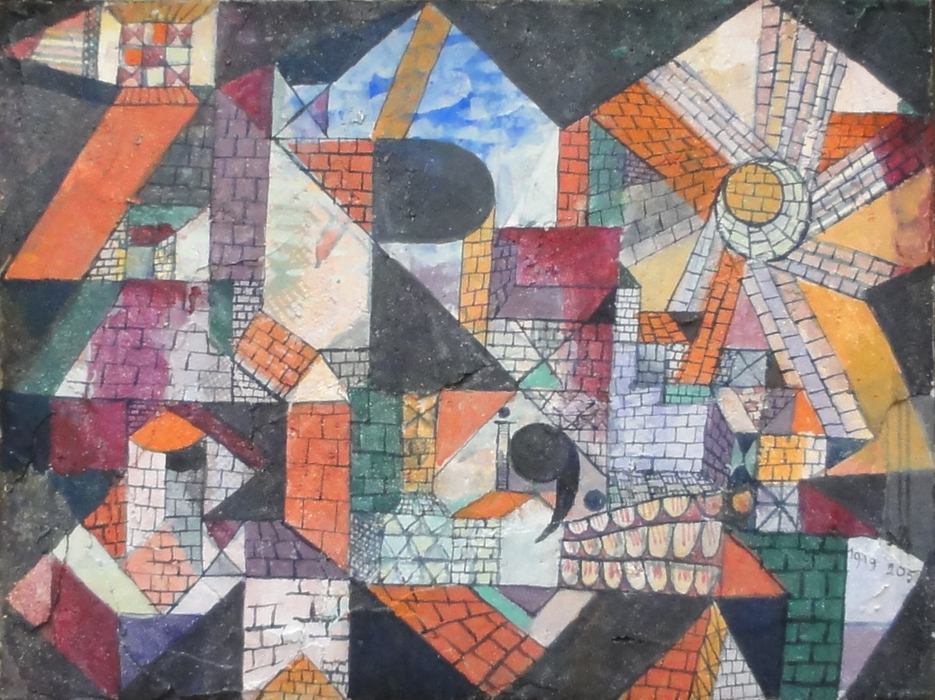 Stadt Rtitle QS:P1476,de:"Stadt R" label QS:Lde,"Stadt R"